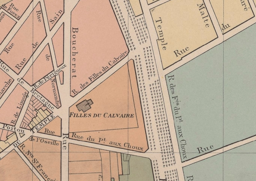 Emplacement du couvent des Filles-du-Calvaire à Paris